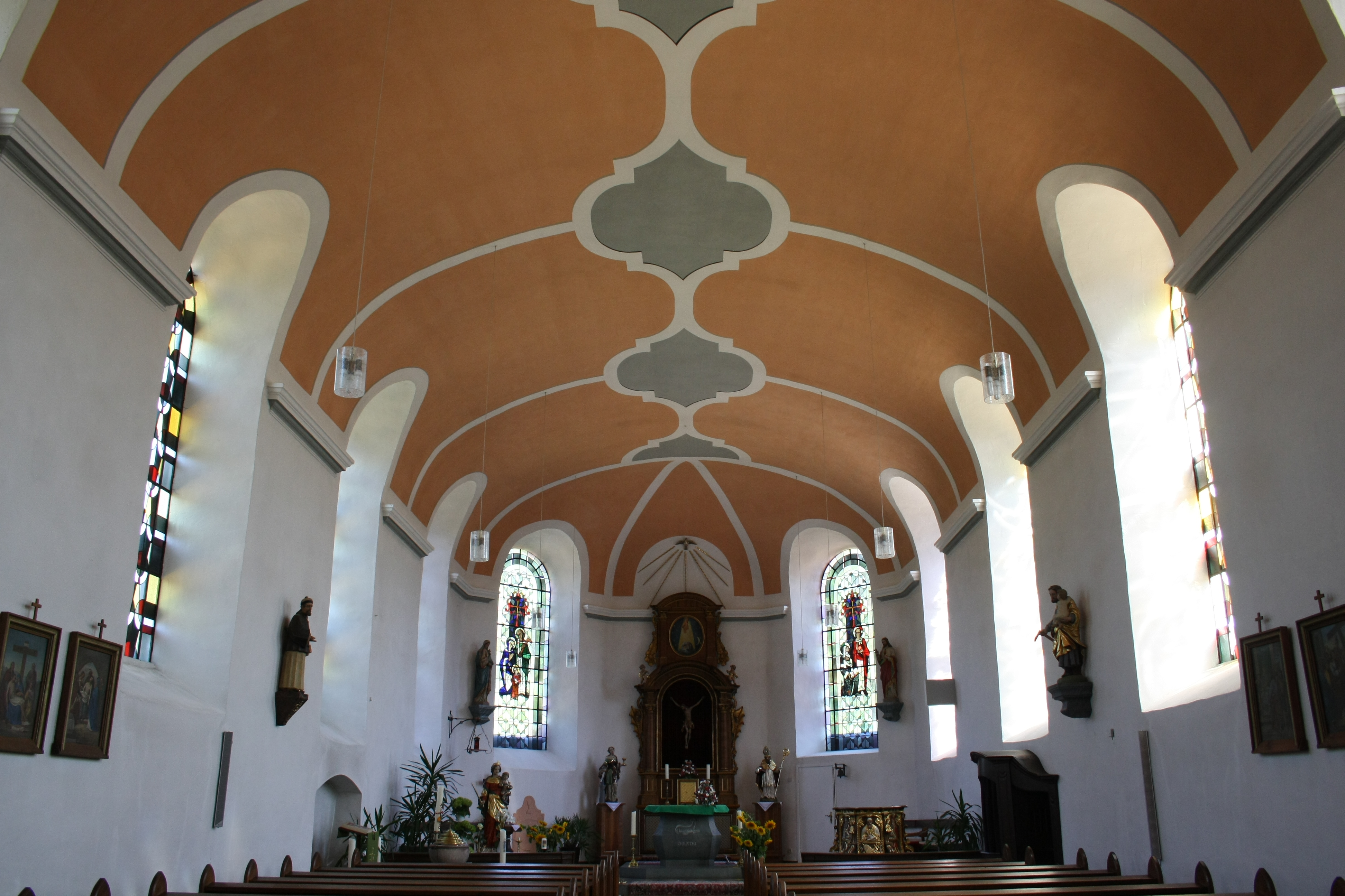 Pfarrkirche St. Maximin in Antweiler, Innenaufnahme